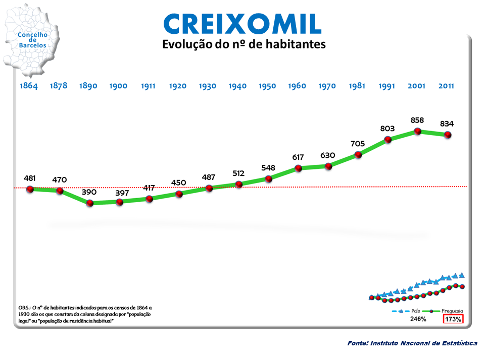 anos1864/2011